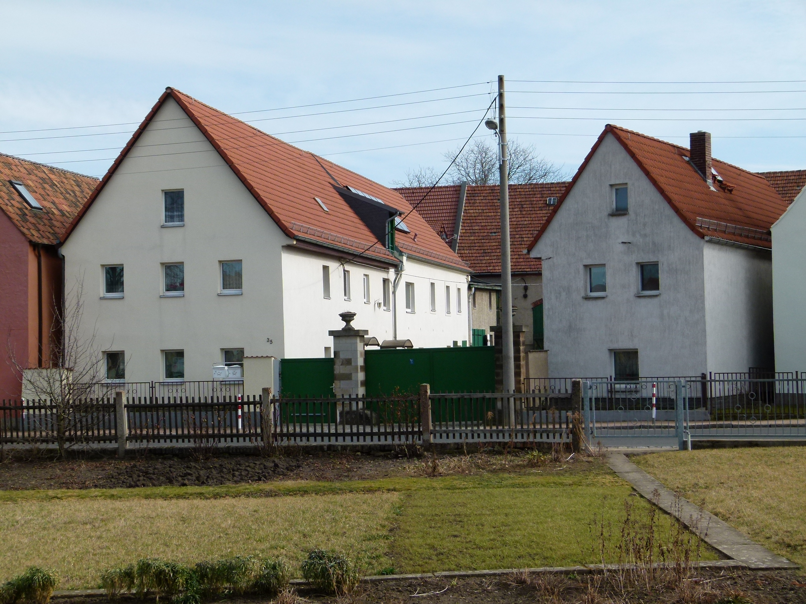 Denkmalgeschützter Bauernhof, Altnaundorf 35, Radebeul